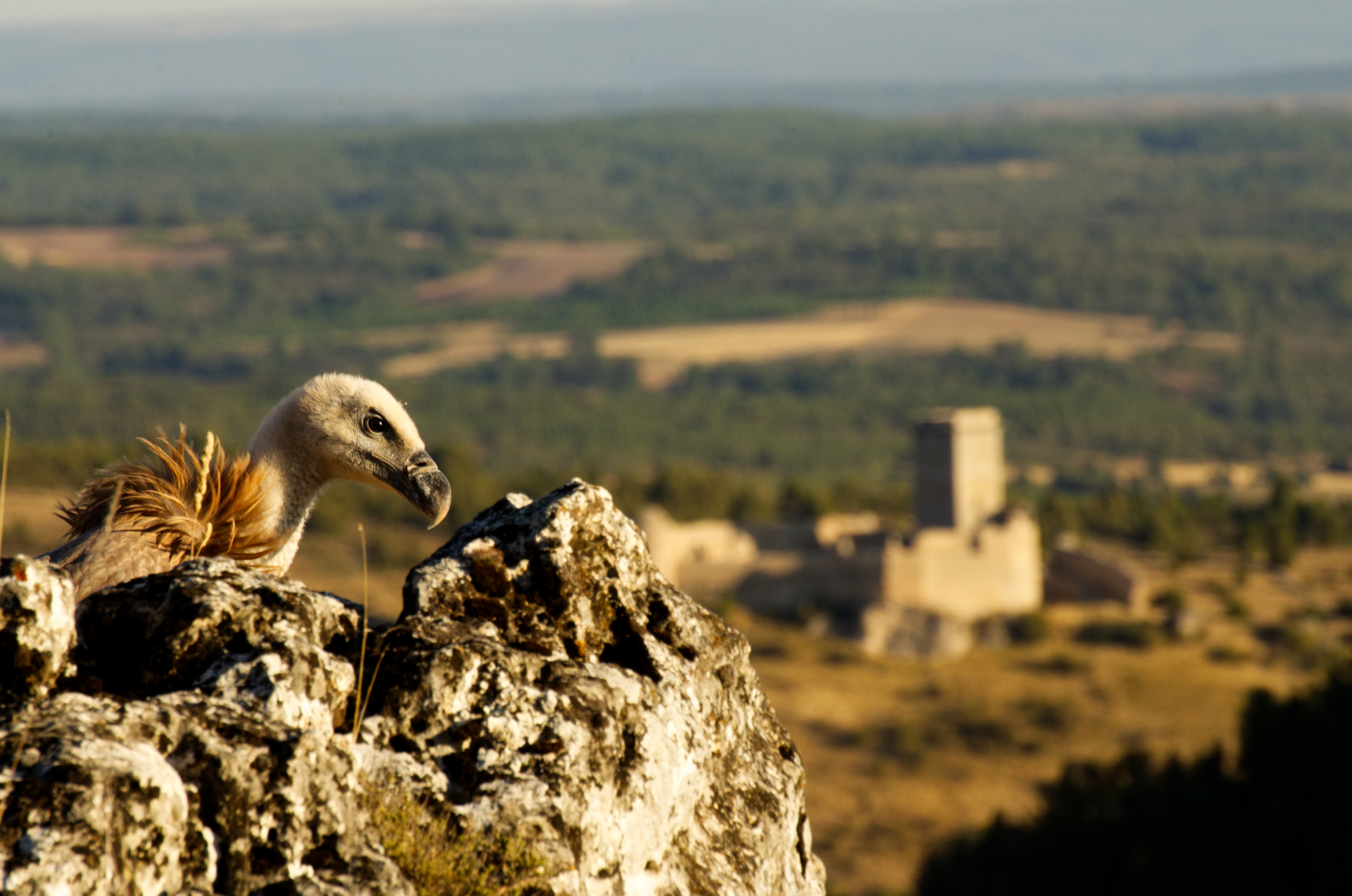 La fotografía representa dos de los elementos fundamentales del cañón del río Lobos, el castillo de Ucero, guardián de la entrada soriana al cañón, y el buitre leonado, el animal más representativo. This is a photography of a Special Area of Conservation in Spain with the ID: ES4170135. Natura2000 entry, EEA entry